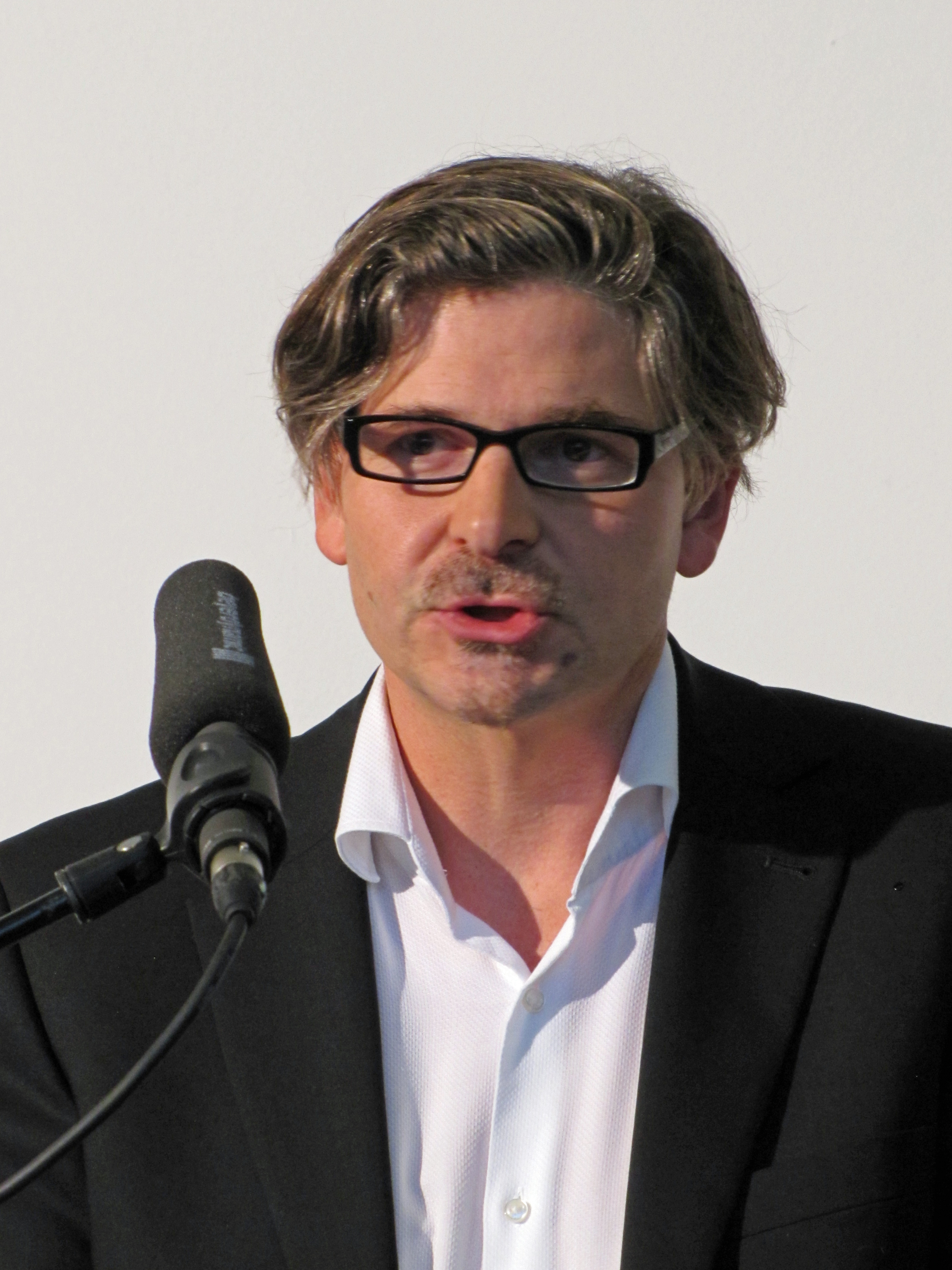 Jan-Werner Müller, deutscher Politikwissenschaftler, Dozent und Autor. Oktober 2013 in Frankfurt am Main bei den Römerberggesprächen.